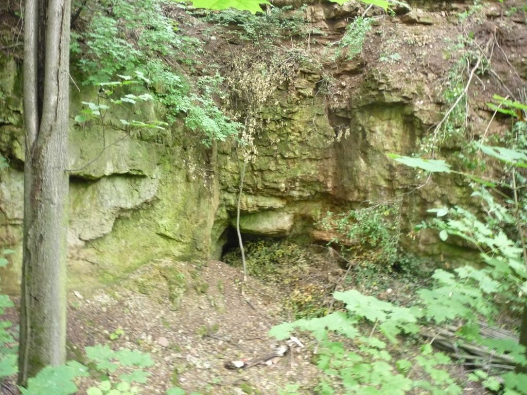 Wejście do jaskini Lisiej w Płóczkach Dolnych